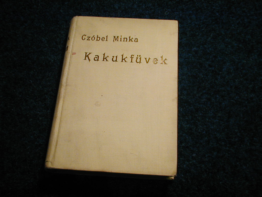 Czóbel Minka - Kakukfüvek c. verseskötetének borítója. Bp. 1901. Athenaeum kiadó. Első kiadás.